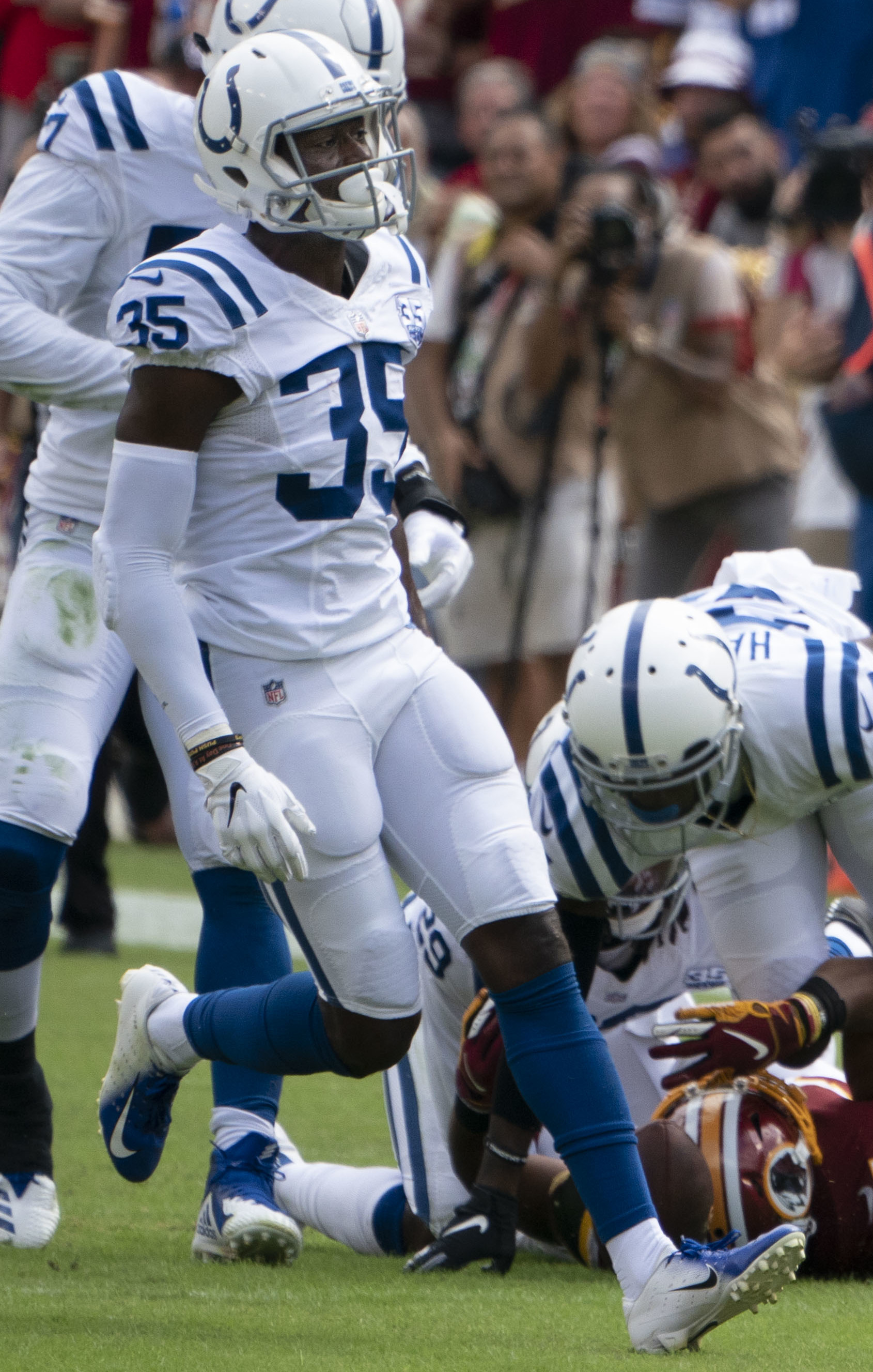 Colts at Redskins 09/16/18